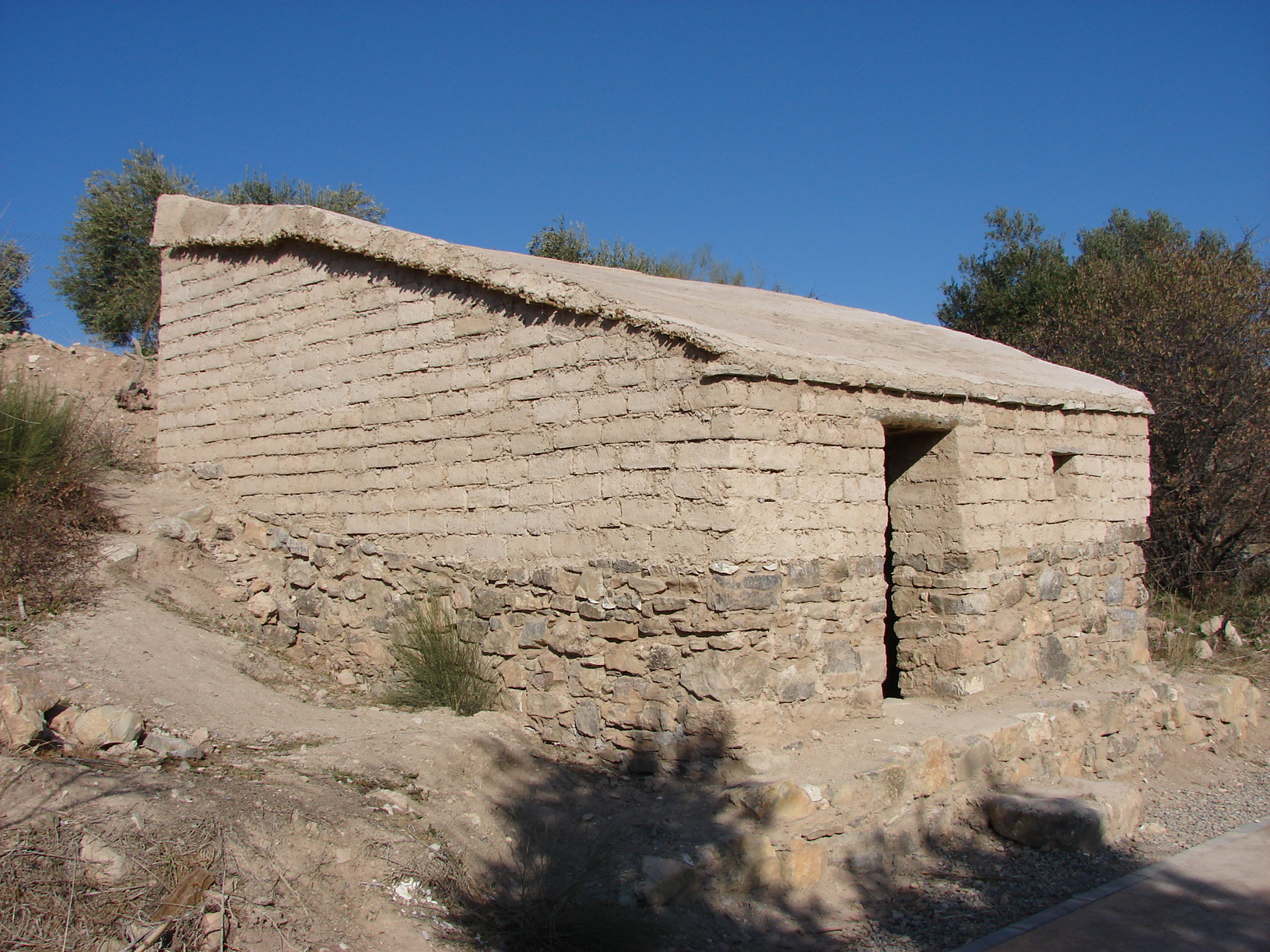 Recreación de una casa ibérica en Almedinilla.